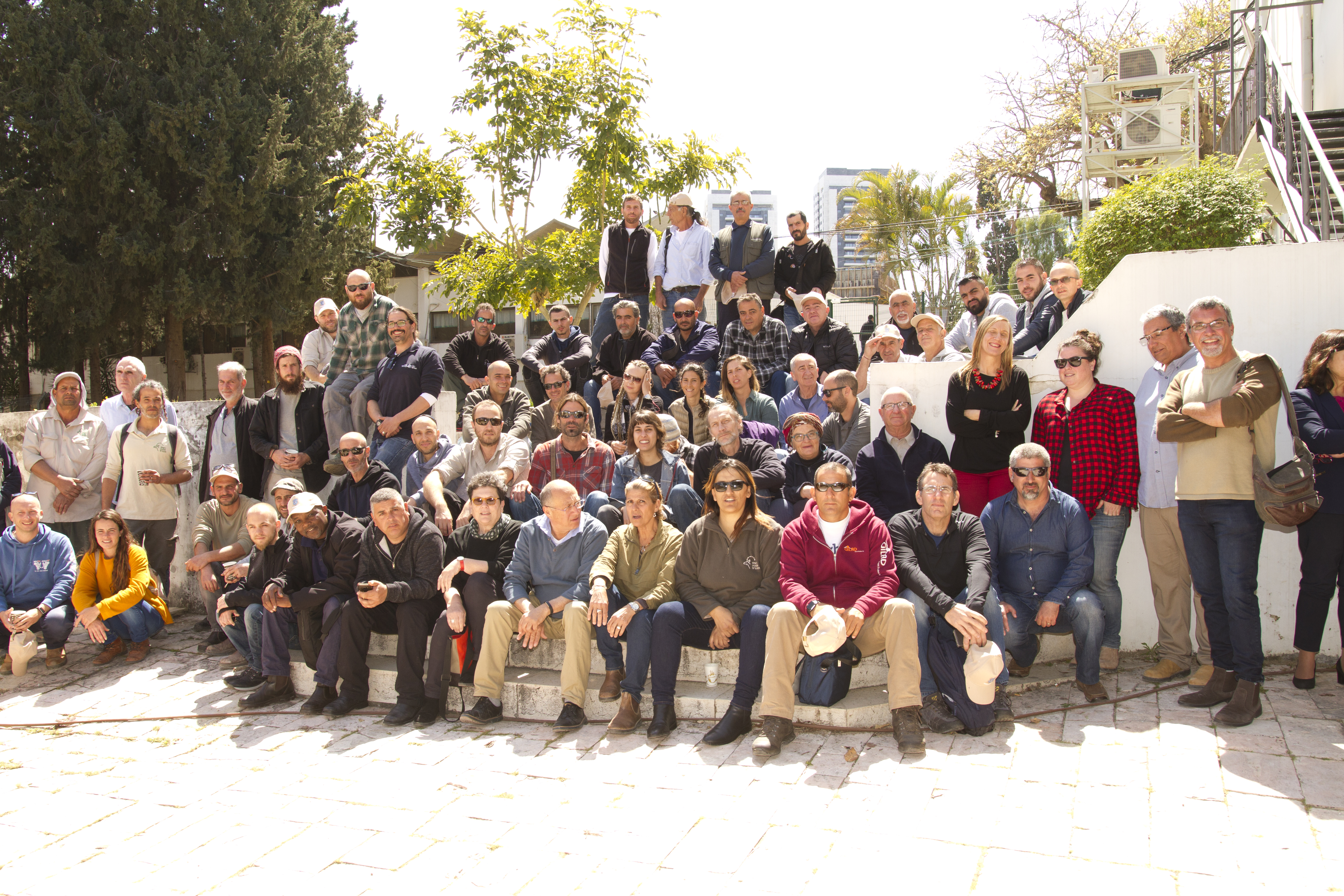 תמונה קבוצית של משתתפי כנס משמרי המורשת הבנויה 2019